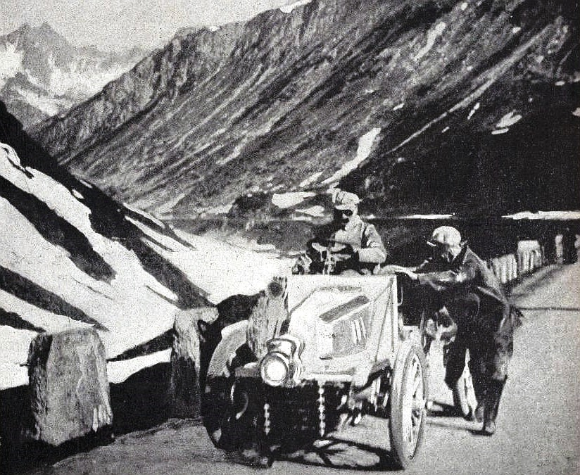 Concurrent du Paris-Vienne 1902 poussé dans le massif de l'Arlberg, La Vie en Plein Air du 1er juillet 1902, p.436